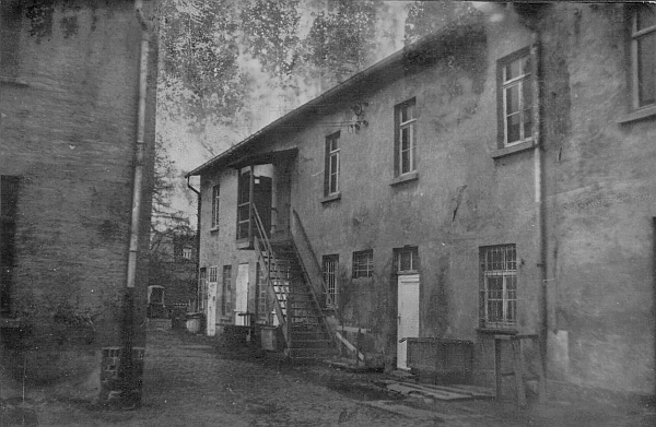 Udo Meinelt & Söhne, Rötha, Kürschnerei und Pelzzurichterei. Das Hauptgebäude in den 1930er Jahren.